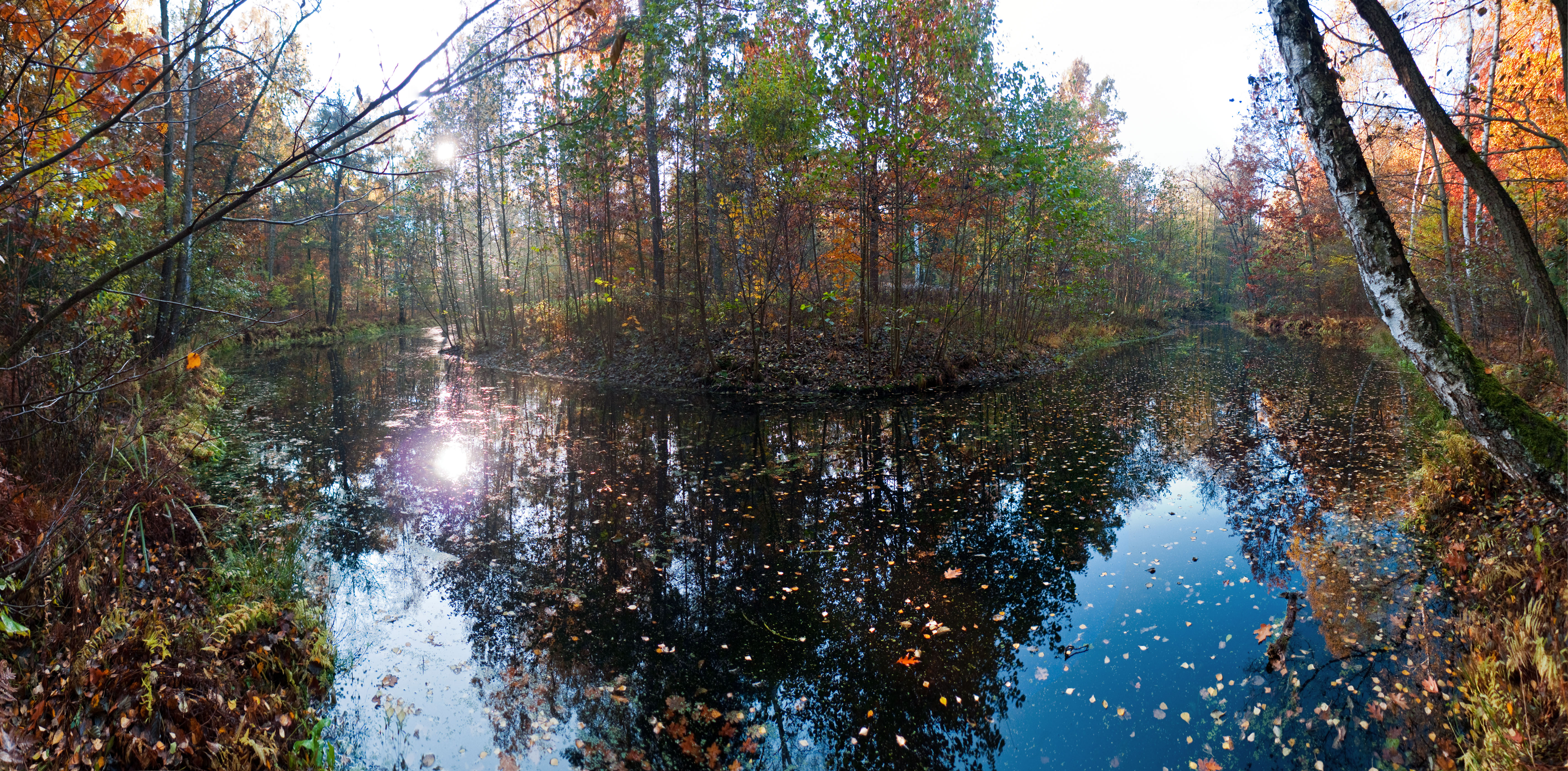 Naturschutzgebiet Krumme Lake, Berlin-Grünau, siehe [1]